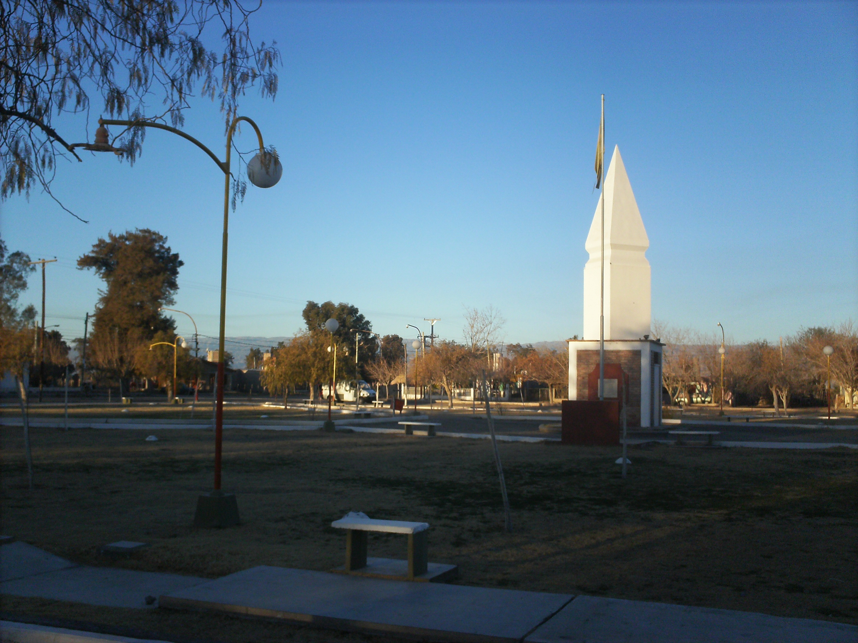 la plaza de la localidad capitalina